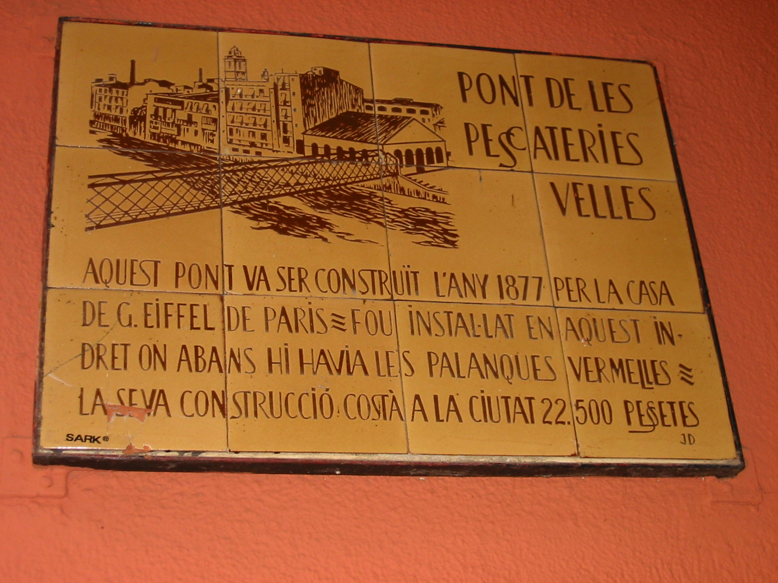 Iscrizione sul Pont Effeil di Girona: Ponte dei Vecchi Pescatori Questo ponte venne costruito nell'anno 1877 per la casa di G. Eiffel di Parigi, «Fu installato in questo luogo dove prima c'erano delle passarelle rosse» La sua costruzione costò alla città 22.500 pesetas.